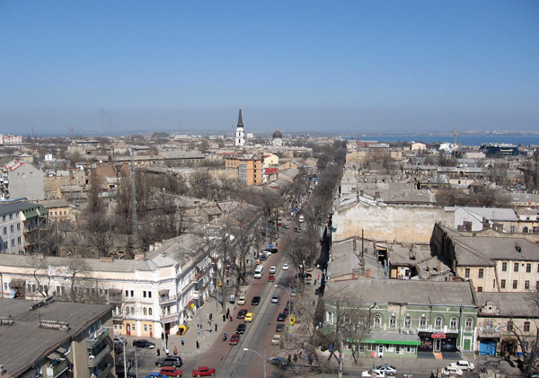 Улица Преображенская в Одессе